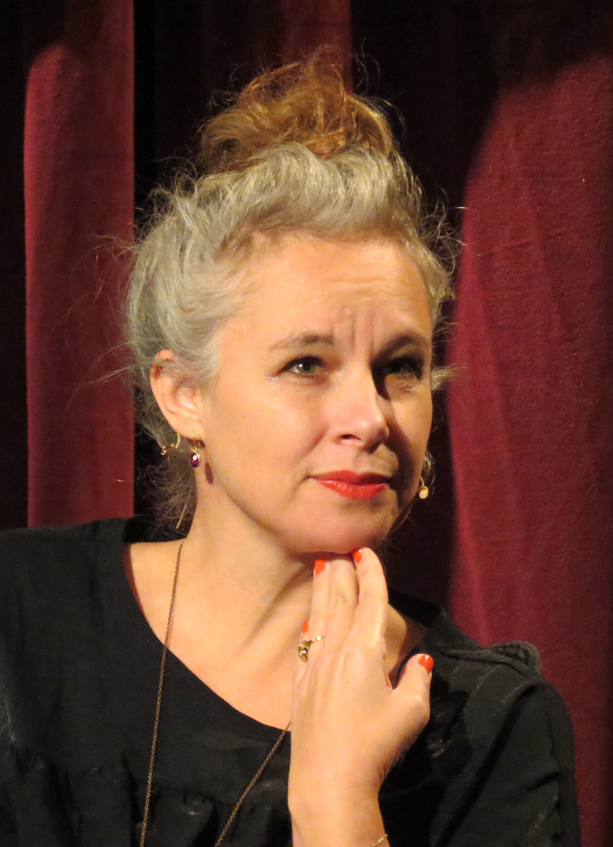 Sara Stridsberg på Bokmässan i Göteborg 2018.